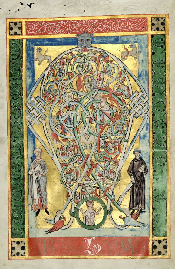 Mater Verborum, титульный лист. Описание см. в статье М. Ламанского File:Новейшие памятники древнечешского языка (Ламанский).djvu (стр. 49)